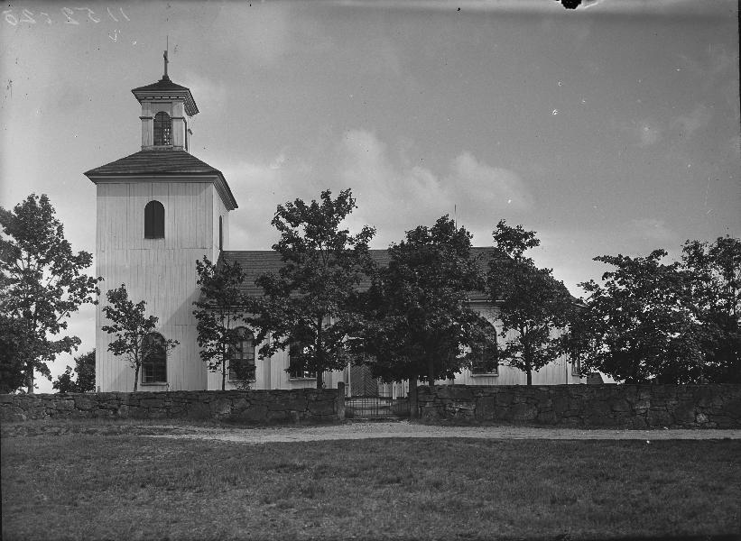 Kyrkan från söder. Snabbinv.